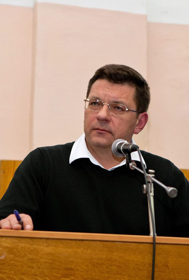 Сергій Олегович Одарич виступає перед студентами ЧДТУ